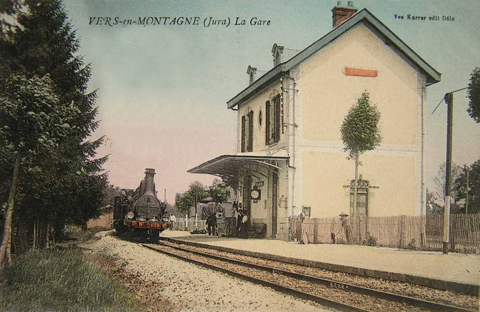 L'intérieur de la gare avec la desserte d'un train vapeur au début des années 2900.